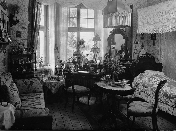 ett rum på höstsol